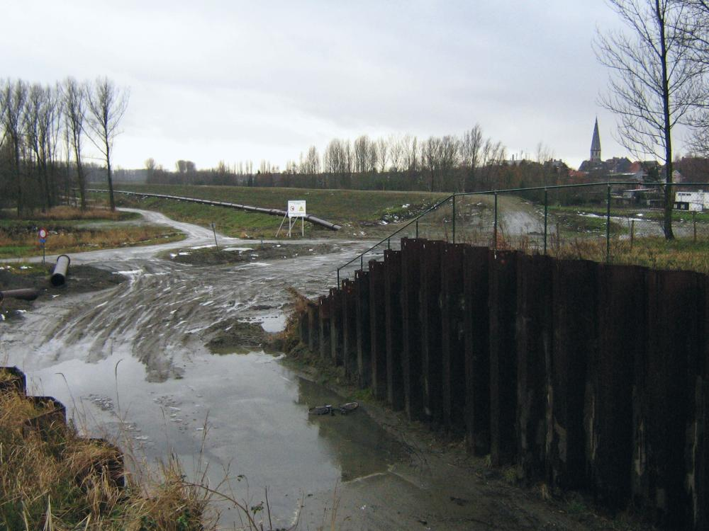 De aanleg van het gecontroleerd overstromingsgebied (GOG) ter hoogte van de noodbrug tussen de Langestraat en het Scheldeveer Kruibeke-Hoboken op 31 december 2005.